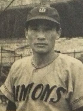 北川桂太郎